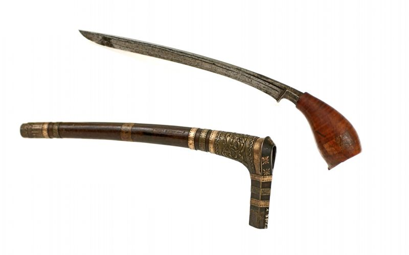 Kris. Kris met houten greep en houten schede